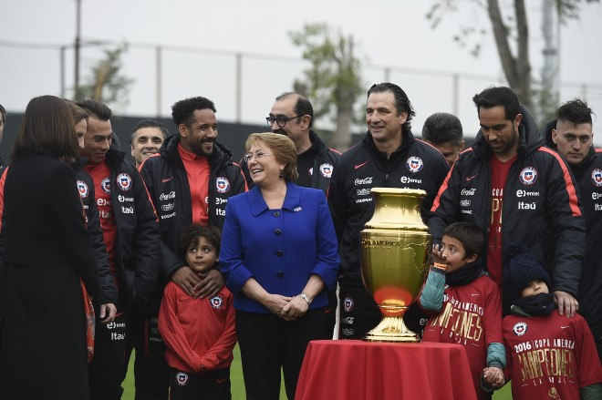 Presidenta a la Selección Nacional: “Muchas gracias por estas alegrías que nos han dado”